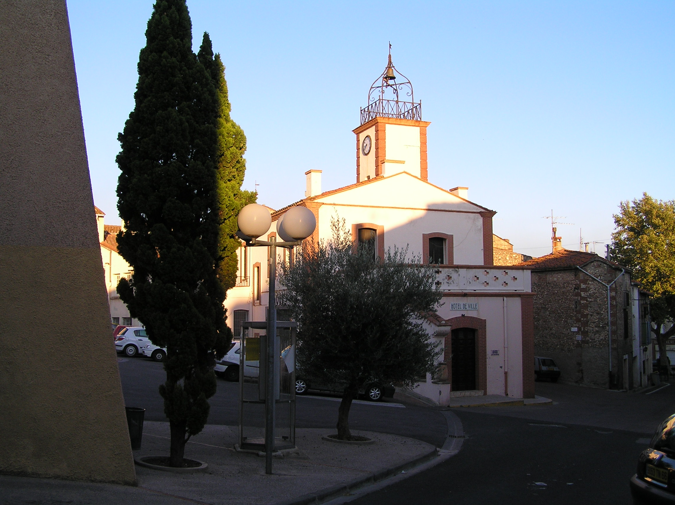 Canohès (Pyrénées Orientales)